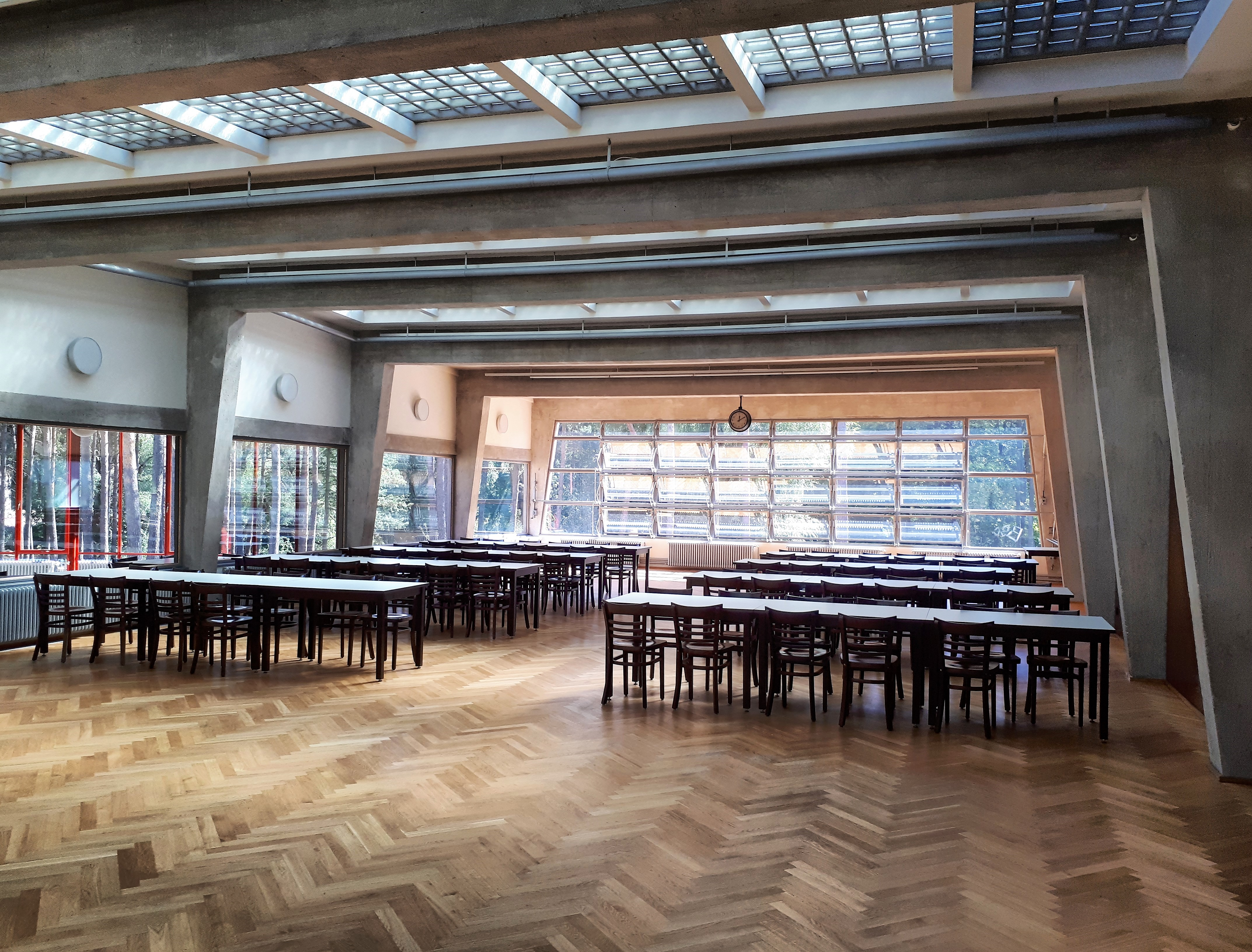 Bernau ADGB-Schule Meyer-Wittwer-Bau Speisesaal